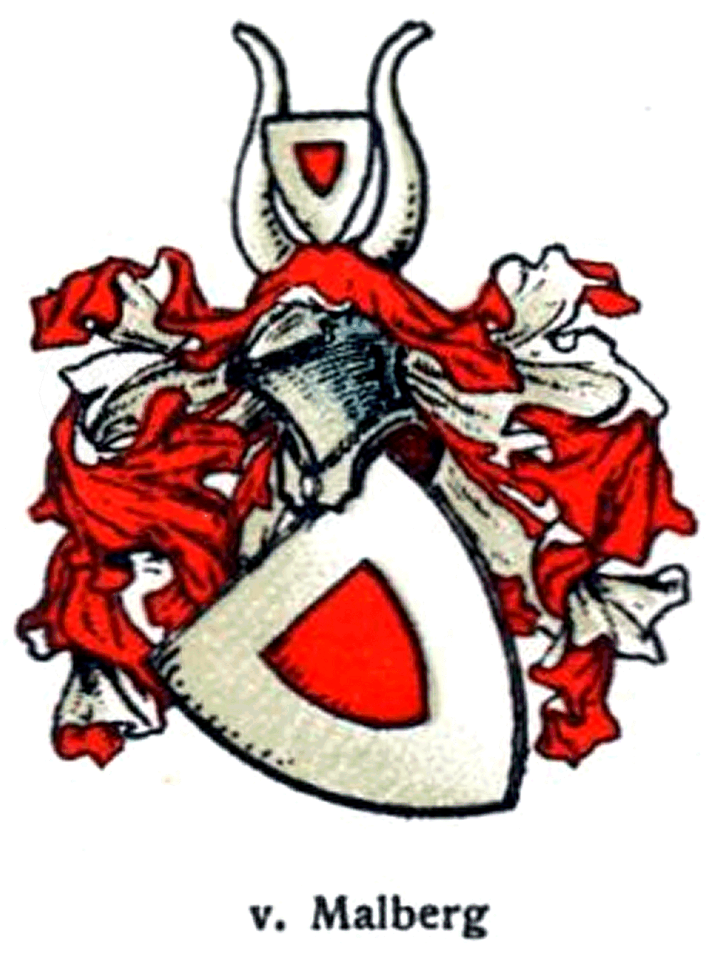 Wappen der Herren von Malberg